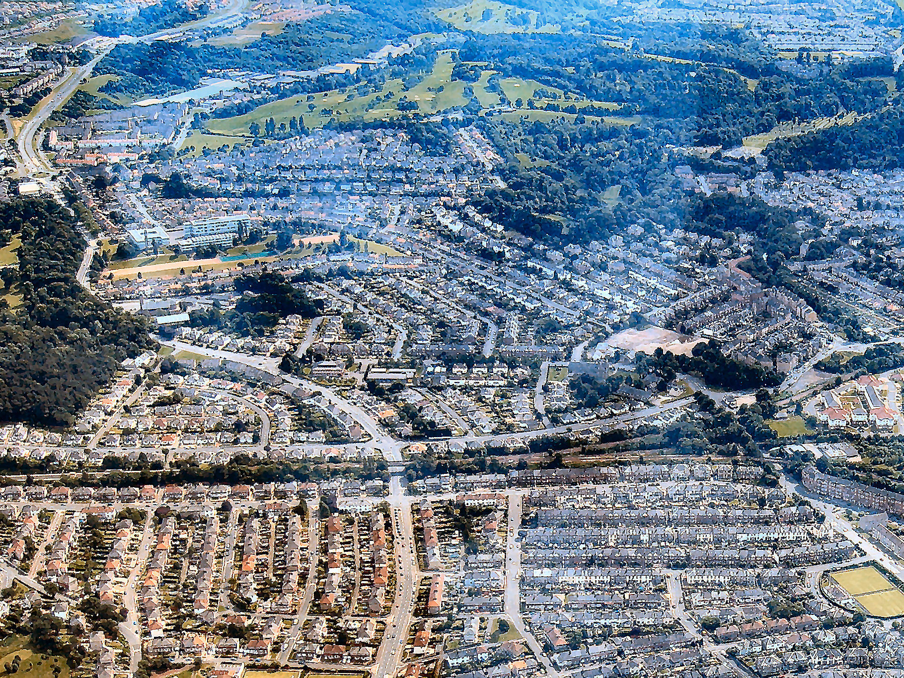 Hampden Park Glasgow